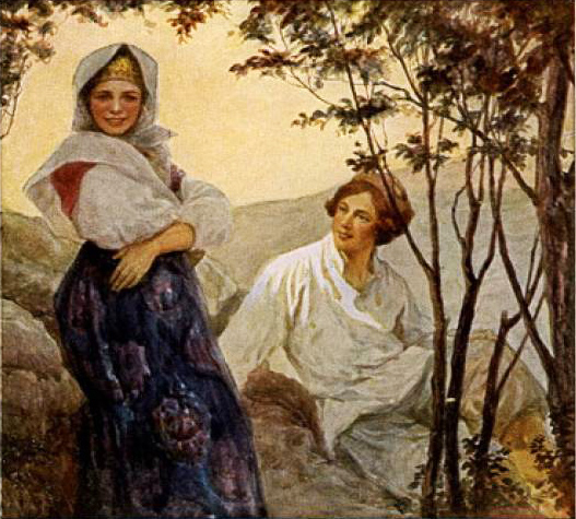 С. С. Соломко. Сердечный вопрос. До 1910 г.